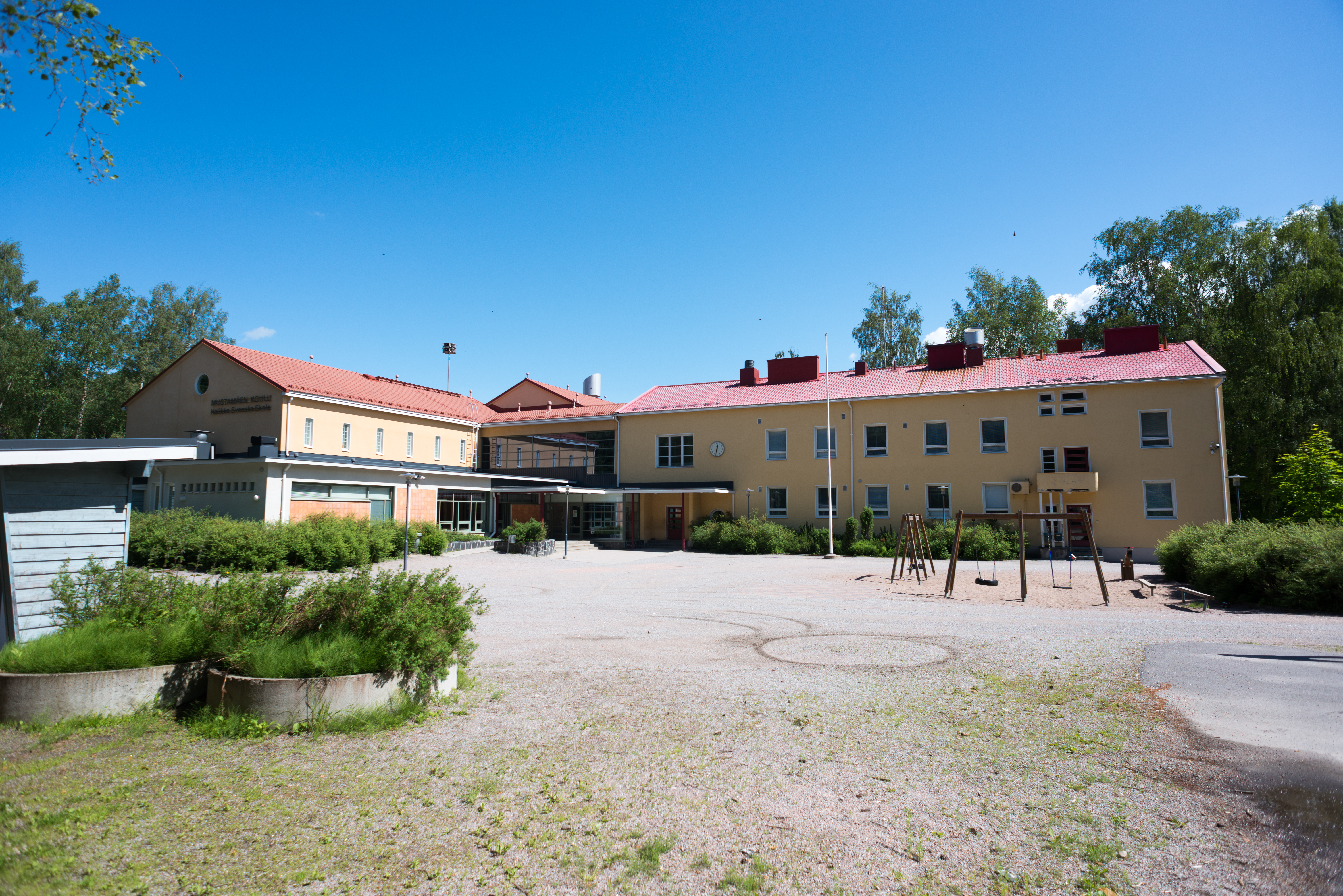 Mustamäen koulu Halikossa